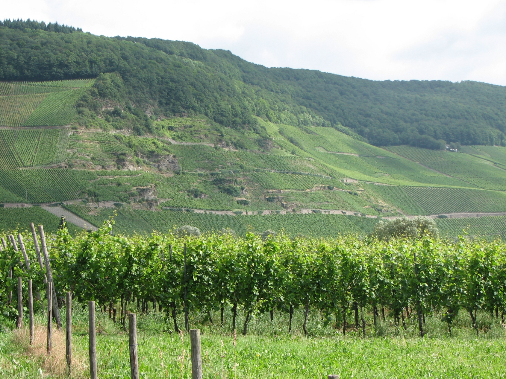 Typisk vindrueområde i Moseldalen. Her mellom Neumagen og Bernkastel.